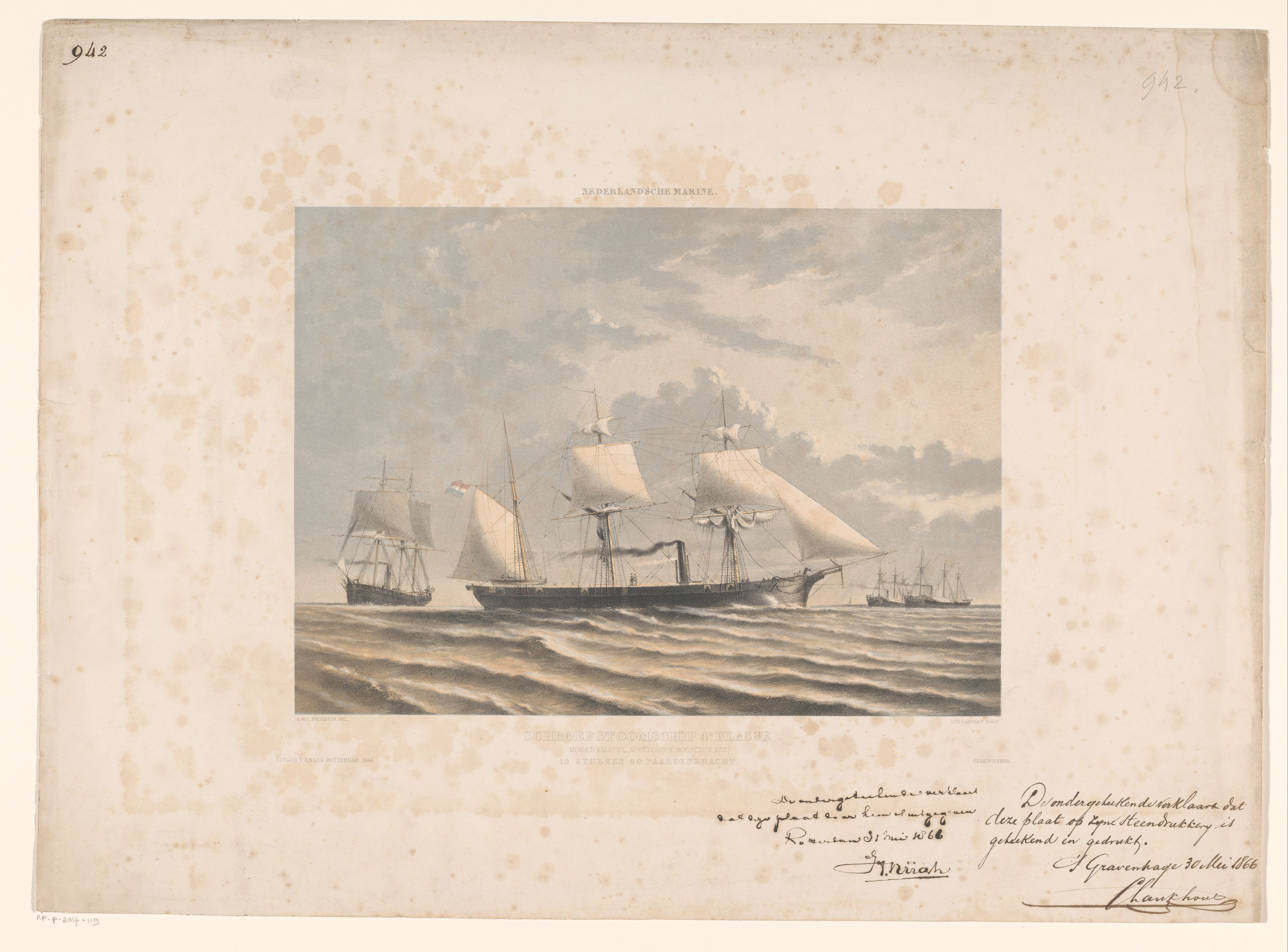 IdentificatieTitel(s): Schroefstoomschip 4e klasse (titel op object)Objecttype: prent Objectnummer: RP-P-2017-119Opschriften / Merken: octrooi-inzending, recto, handgeschreven: ‘De ondergeteekende verklaart / dat deze plaat door hem is uitgegeven / Rotterdam31 mei 1866 / H. Nijgh’octrooi-inzending, recto, handgeschreven: ‘De ondergeteekende verklaard dat / deze plaat op zijne steendrukkerij is / geteekend en gedrukt. / 's Gravenhage 30 mei 1866 / C. Lankhout’Omschrijving: Gezicht op vier schepen Waar: van twee met gehesen zeilen.VervaardigingVervaardiger: prentmaker: Gerard Voorduin (vermeld op object)naar ontwerp van: Gerard Voorduin (vermeld op object)drukker: Samuel Lankhout (vermeld op object)uitgever: H. Nijgh (vermeld op object)Plaats vervaardiging: prentmaker: Den Haagnaar ontwerp van: Den Haagdrukker: Den Haaguitgever: RotterdamDatering: 1866Fysieke kenmerken: toonlithografie in zwart met toonblok in beige en blauwMateriaal: papier Techniek: toonlithografieAfmetingen: blad: h 450 mm × b 620 mmOnderwerpWat: steamship, motorshipVerwerving en rechtenVerwerving: onbekend 2017Copyright: Publiek domein